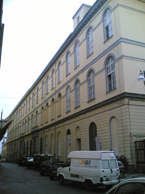 Complesso di Sant'Andrea delle Dame (Napoli)